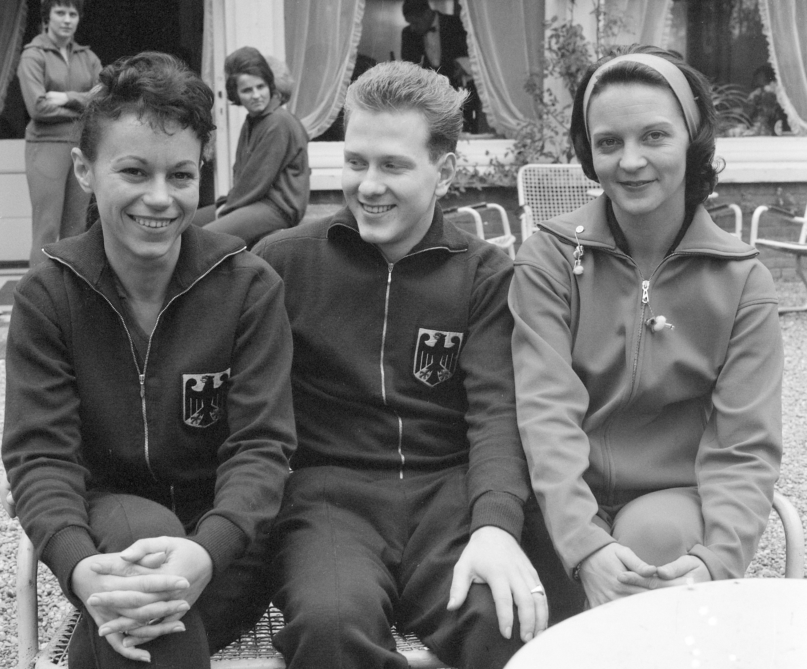 Internationale Tafeltenniskampioenschappen 1962, in Krelagehuis te Haarlem, v.l.n.r. Agnes Simon (Dld), Scholer (Dld) en Rowe (Eng)